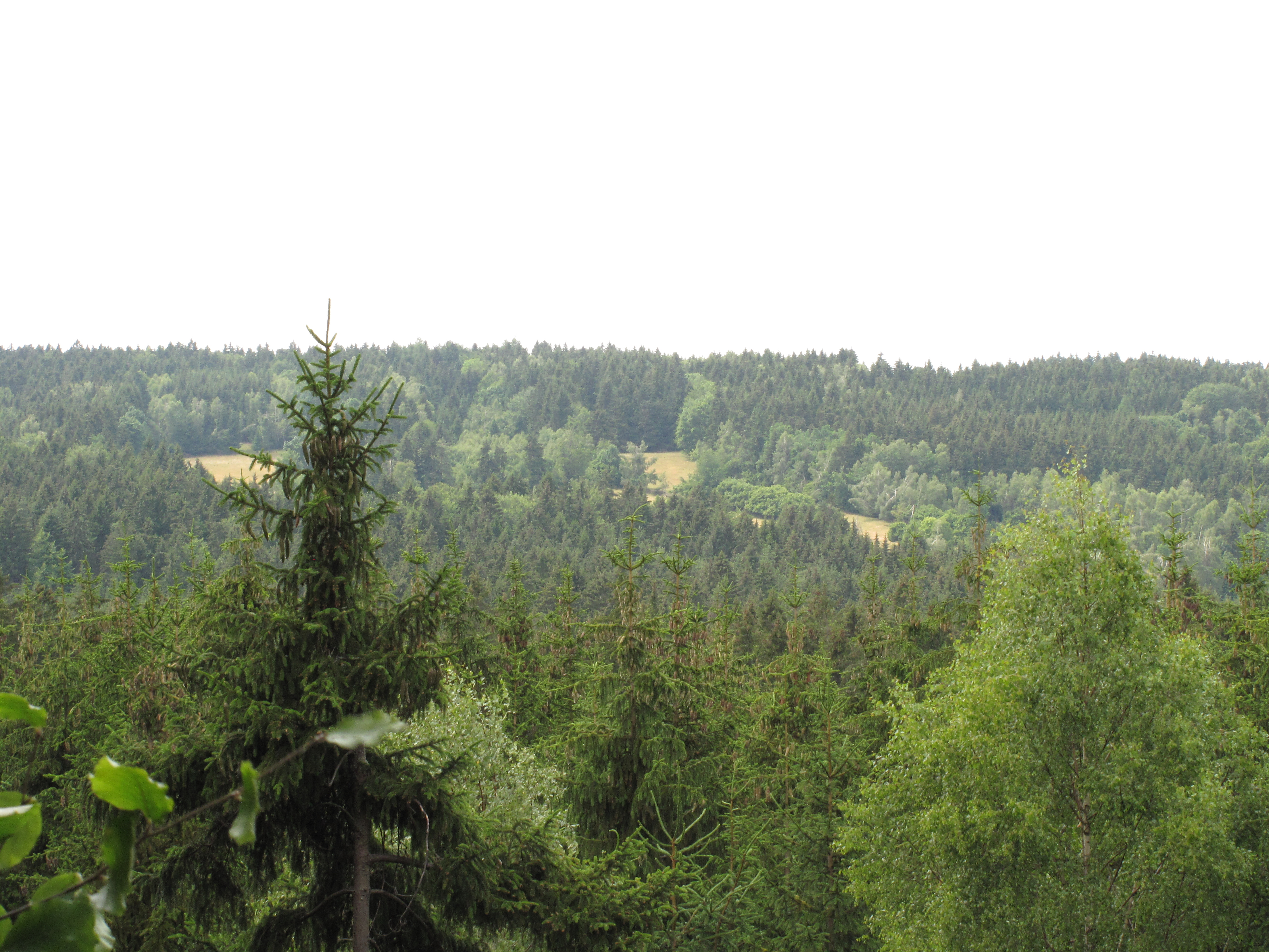 Přírodní památka Pod Mešnicí. Okres Jihlava, Česká republika.